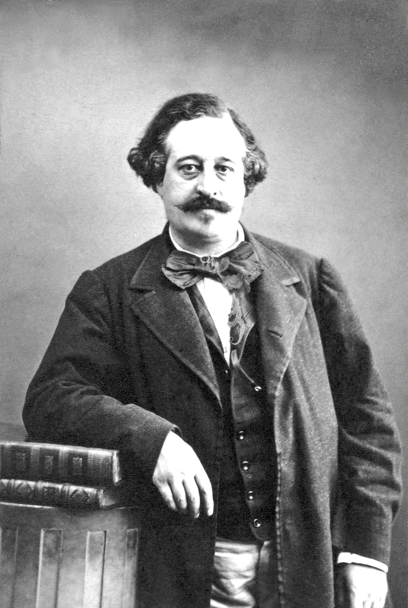 Photograph of Jules Noriac (1827–1882), French journalist, playwright, writer, librettist and theatre director.